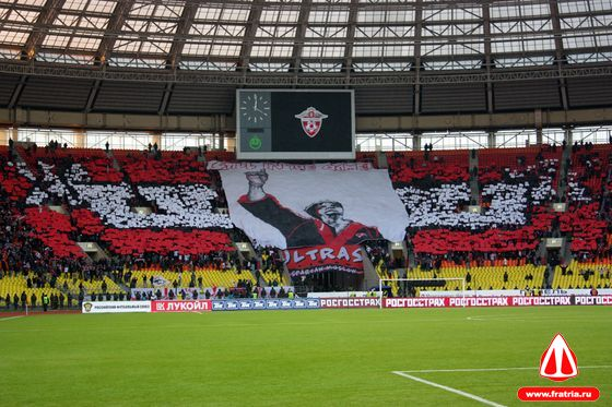 Перфоманс "Still in the game" на матче с "Локомотивом". 2008 год